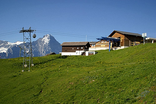 Bergstation 'First' der Firstbahn oberhalb von Grindelwald BE, Schweiz